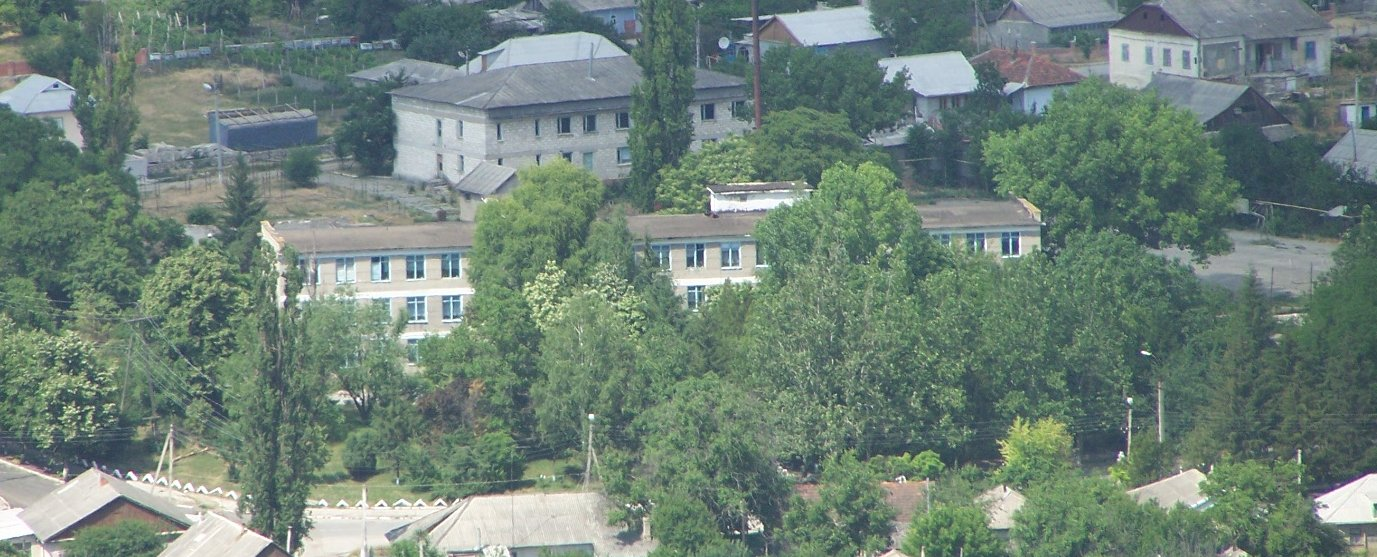 Русский Лицей им.Есенина